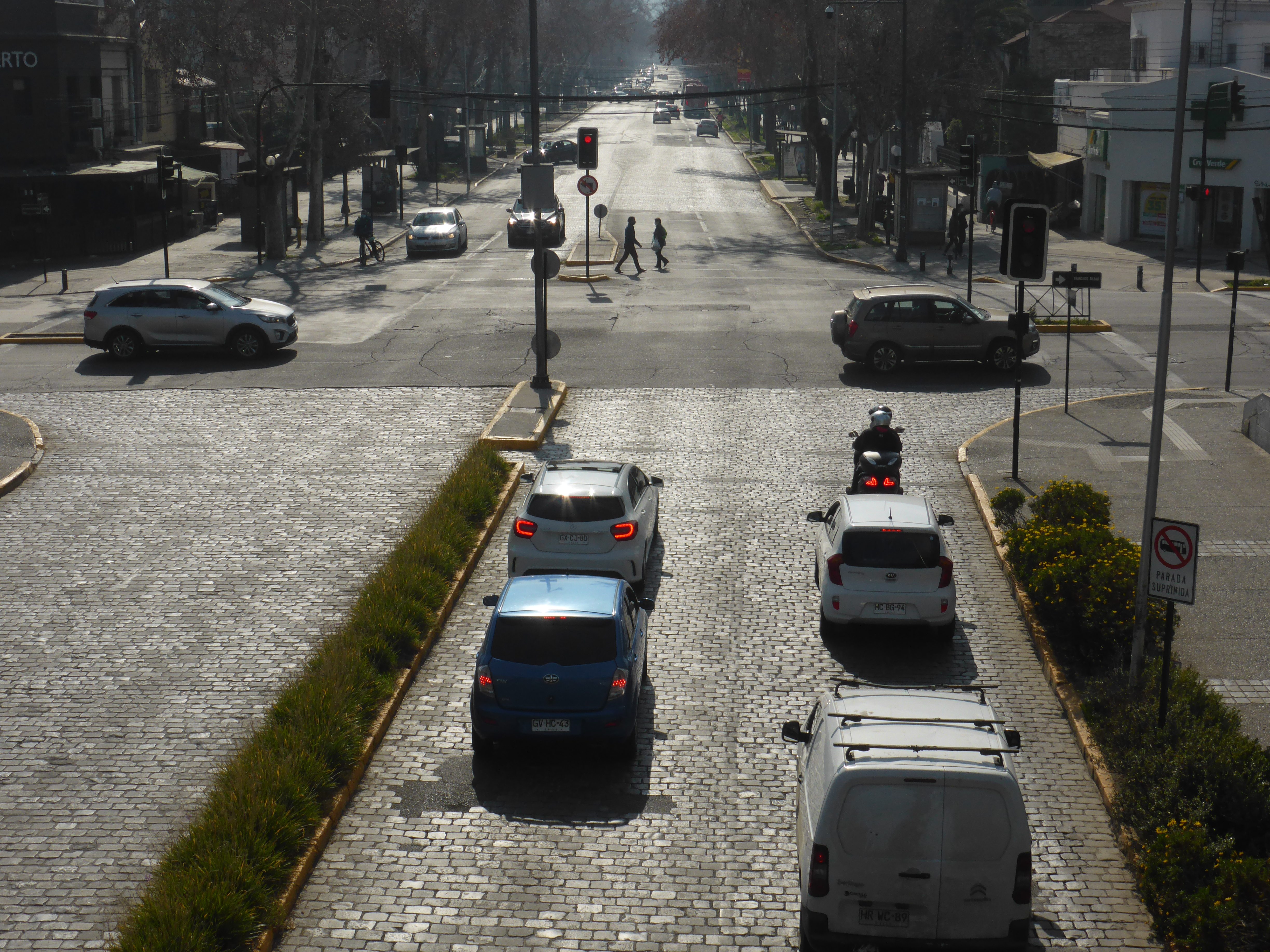 El pavimento de adoquines originales distingue el tramo de la Avenida Pedro de Valdivia en la comuna de Providencia.